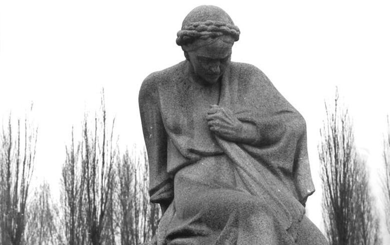 "Für Bezieher des ADN-Reportagedienstes!Zum Beitrag:Ihre Steine markieren historische Abschnitte-Lausitzer Granit-Werkstoff für Gebäudefassaden und Kunstwerke. ADN-ZB-Sturm-7. 3. 80-bb-Die gramgebeugte ""Mutter Heimat""am Eingang zum Ehrenhain des Treptower Parkes in Berlin. Der gewaltige Granitblock, aus dem dieses Denkmal geschaffen wurde, war einer der ersten Aufträge, den die Lausitzer Granitwerke unweit von Demitz-Thumitz im Bezirk Dresden, nach Wiederaufnahme der Arbeit im Jahre 1945 erfüllten, erteilt von der sowjetischen Militäradministration. An dem Denkmal aus Granit ehren die Berliner alljährlich tausende Gäste der Hauptstadt die für den Frieden und die Zukunkt der Menschheit gefallenen Sowjetsoldaten. (Beachten Sie hierzu auch W0307/301N-303N)"